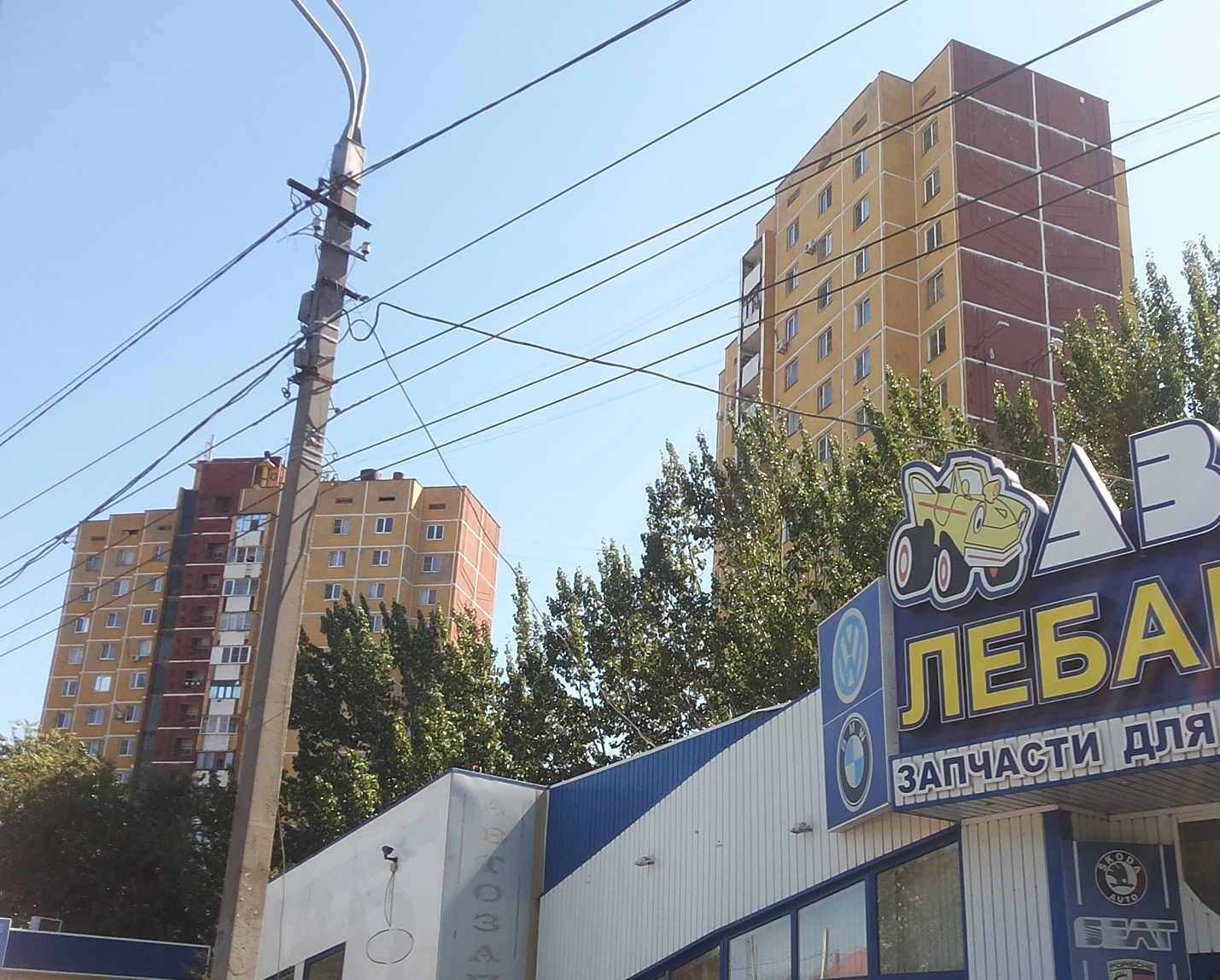 Улица Рокоссовского, 40А и 40В